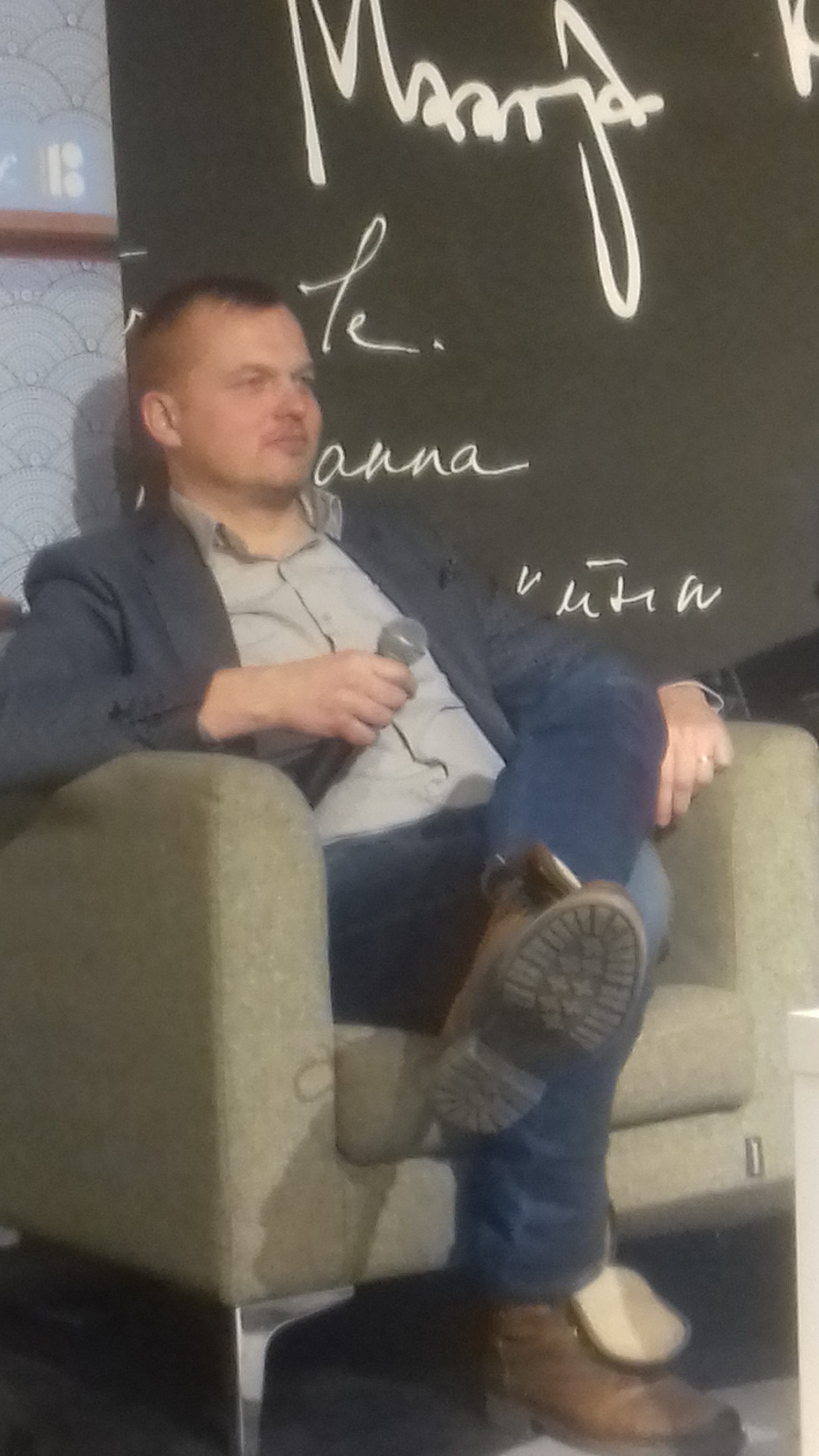 Jaak Juske Kuido Meritsa raamatu "Kas saab vaikust!? Minu aasta meesõpetajana" esitlusel